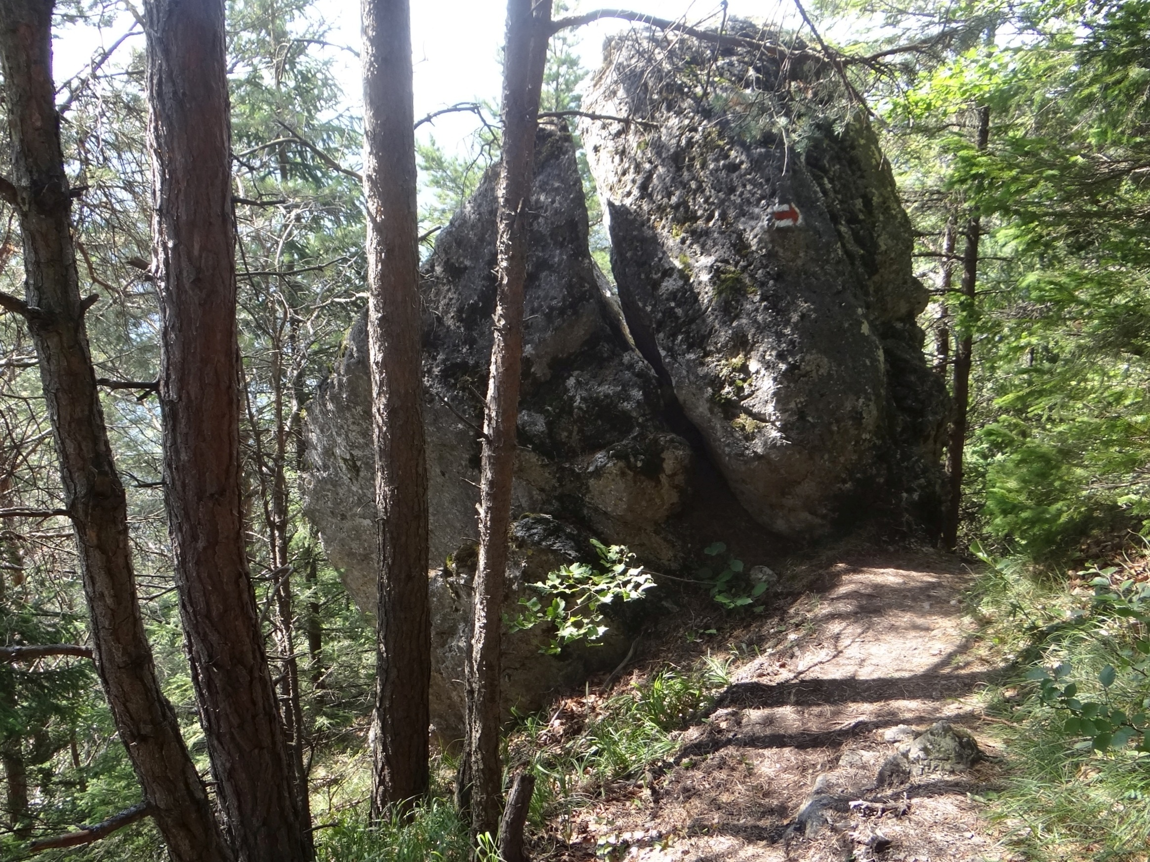 Sidorovo